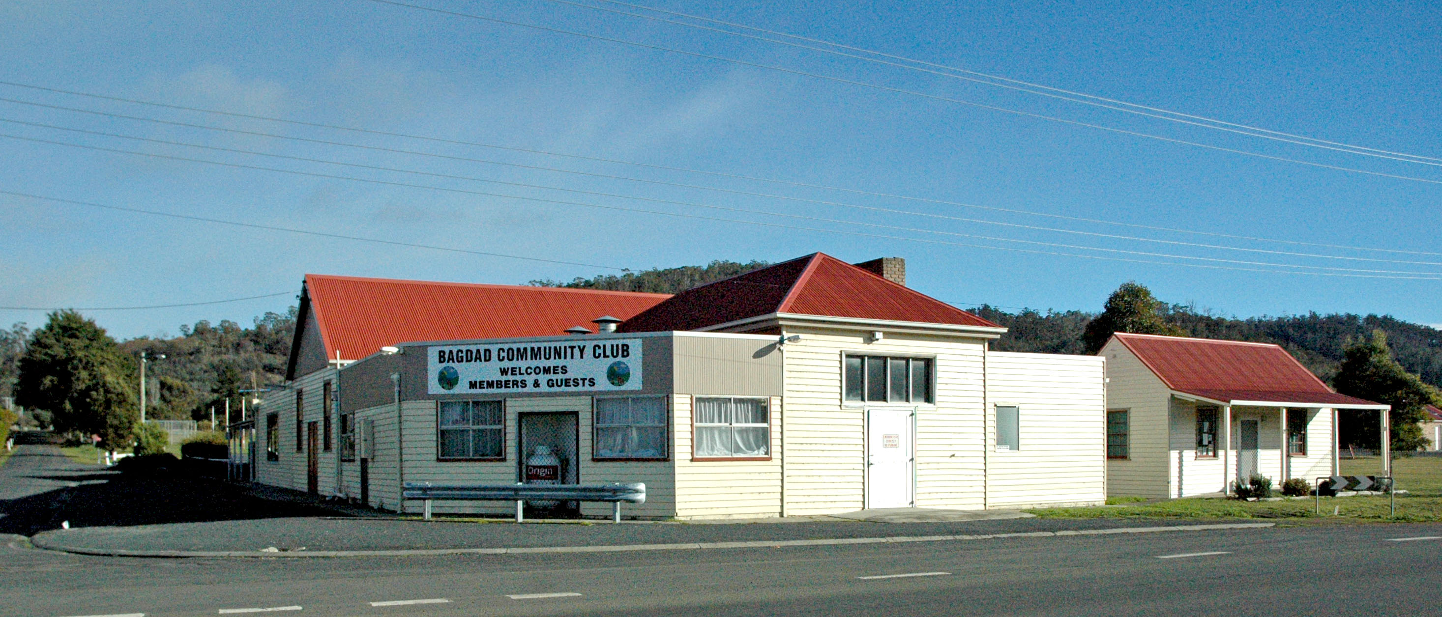 Bagdad Community Club, Bagdad, Tasmania.